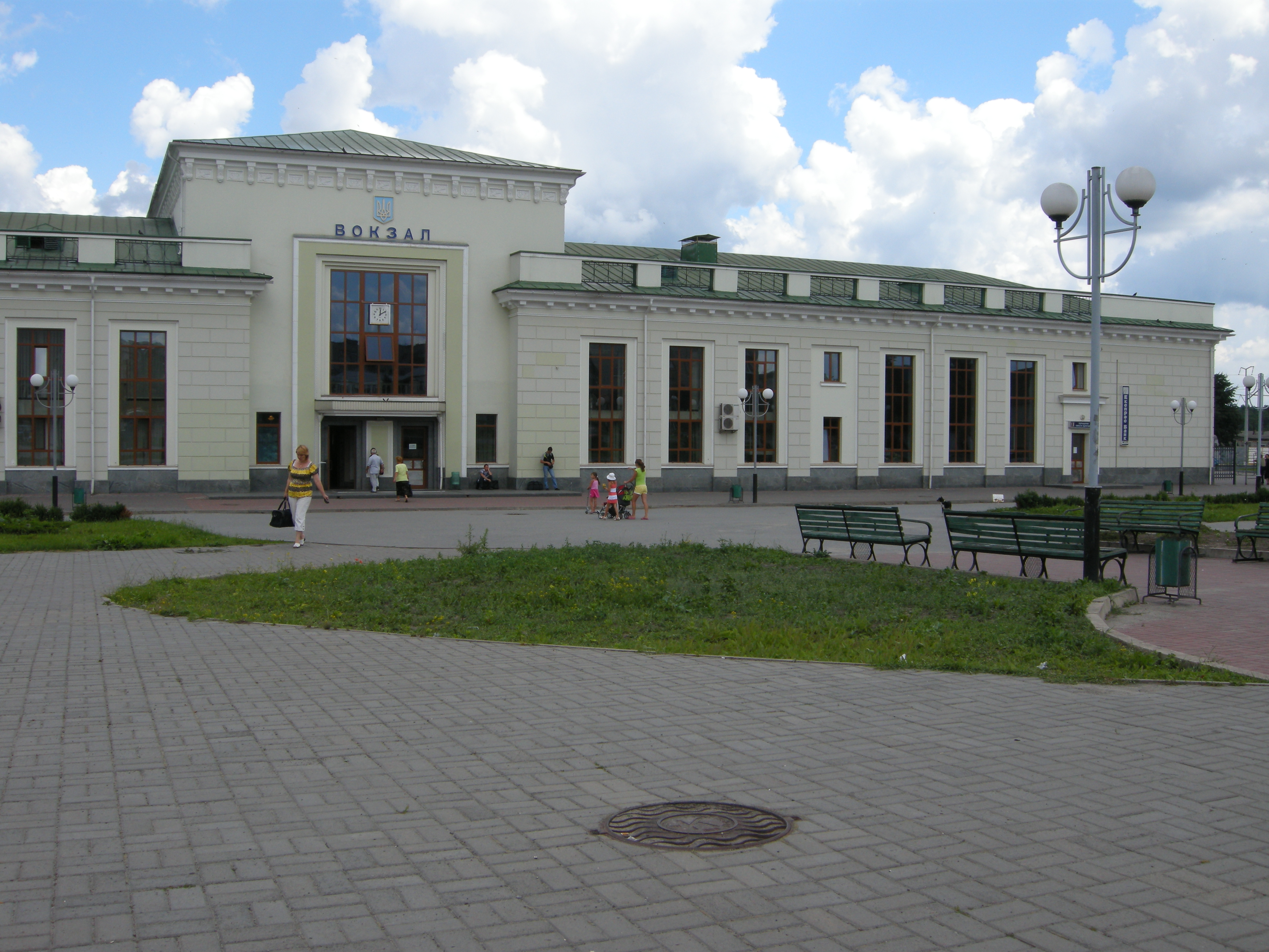 Вокзал у Шепетівці